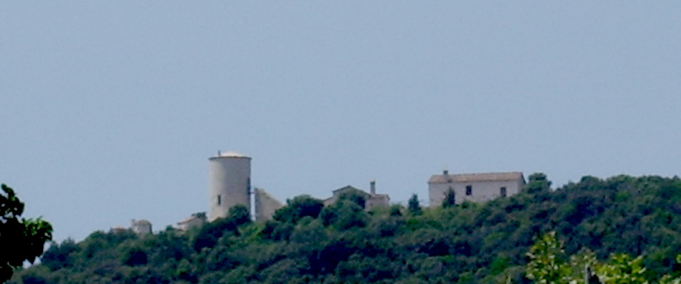 Torre di Cala Galera (Castiglione della Pescaia)